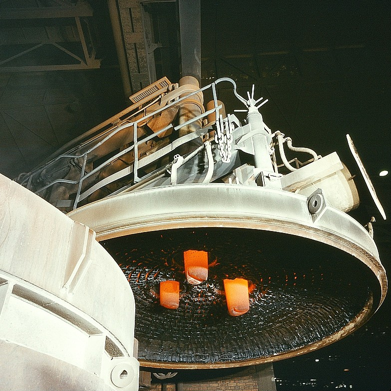 Original image description from the Deutsche Fotothek Metallurge für Hüttentechnik